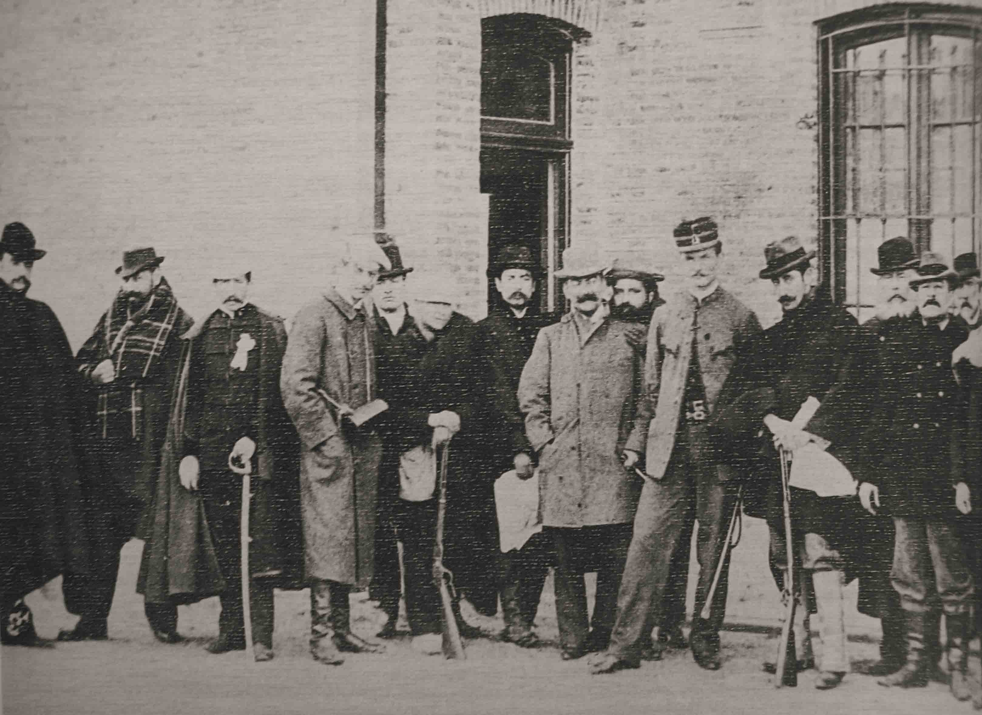 Foto de algunos miembros de la Revolución del Parque, de izq a der: Marcelo T. de Alvear, Jose Crotto, Enrique Pérez, Luis Basaíl, Tomás Valleé, Mariano de la Riestra.